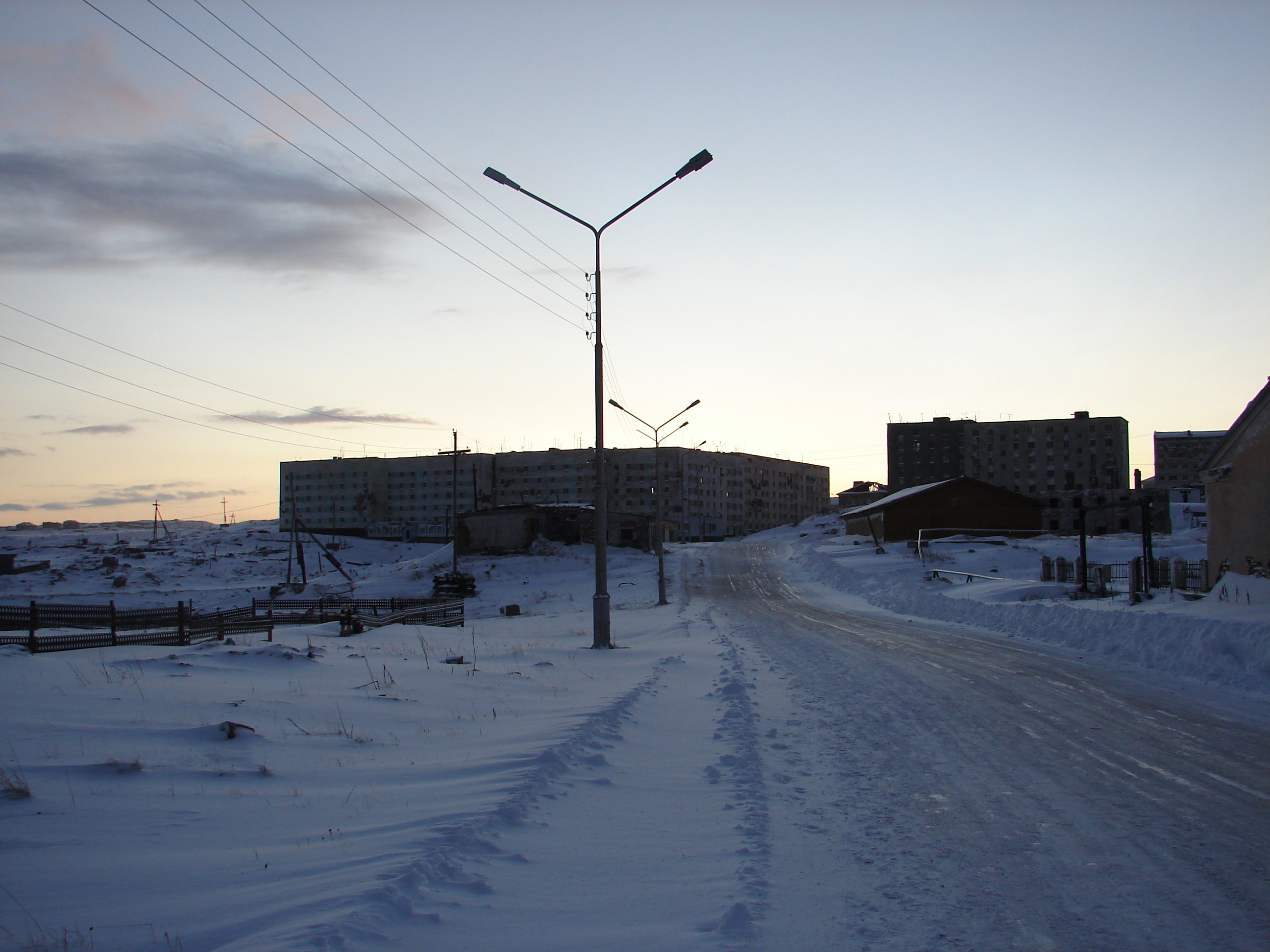 Гремиха